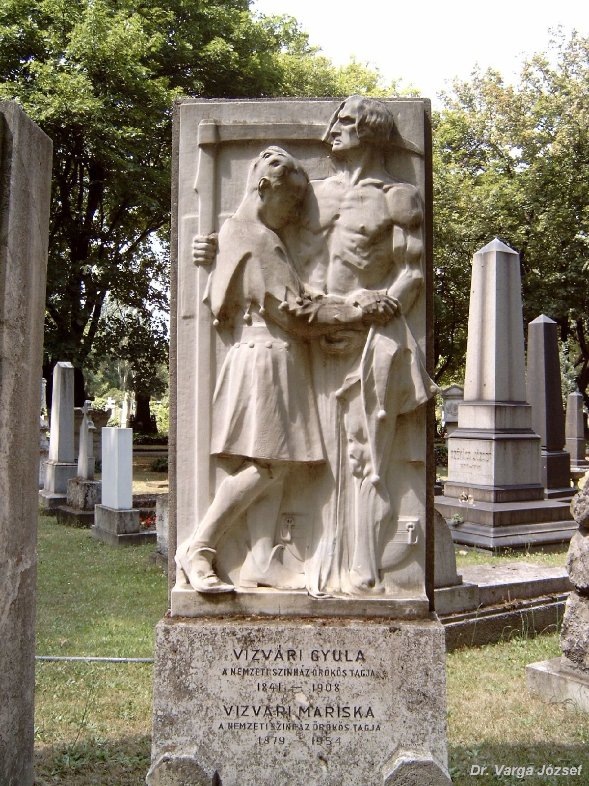 Vizvári Gyula, (Vizváry, Viszkidenszky) (Buda 1841. július 4. – Margitliget, 1908. december 25.): drámai színész, a Nemzeti Színház híres komikusa és Vizvári Mariska (Budapest, 1877. május 27. – Budapest, 1954. január 9.) színésznő sírja Budapesten. Kerepesi temető: 34/1-3-19 [szobrász: Margó Ede].